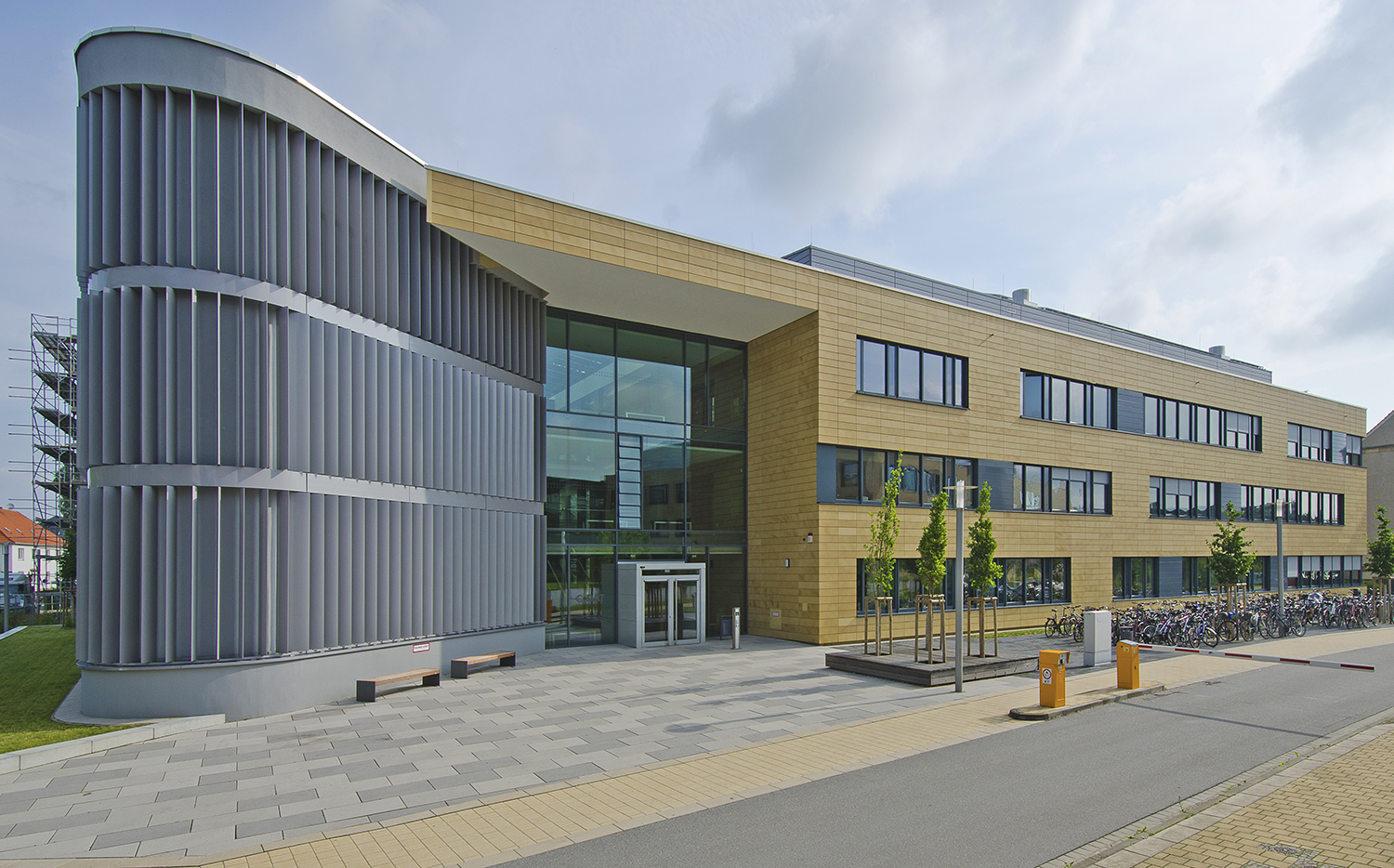 Fotografie des Center of Drug Absorption and Transport (Greifswald)